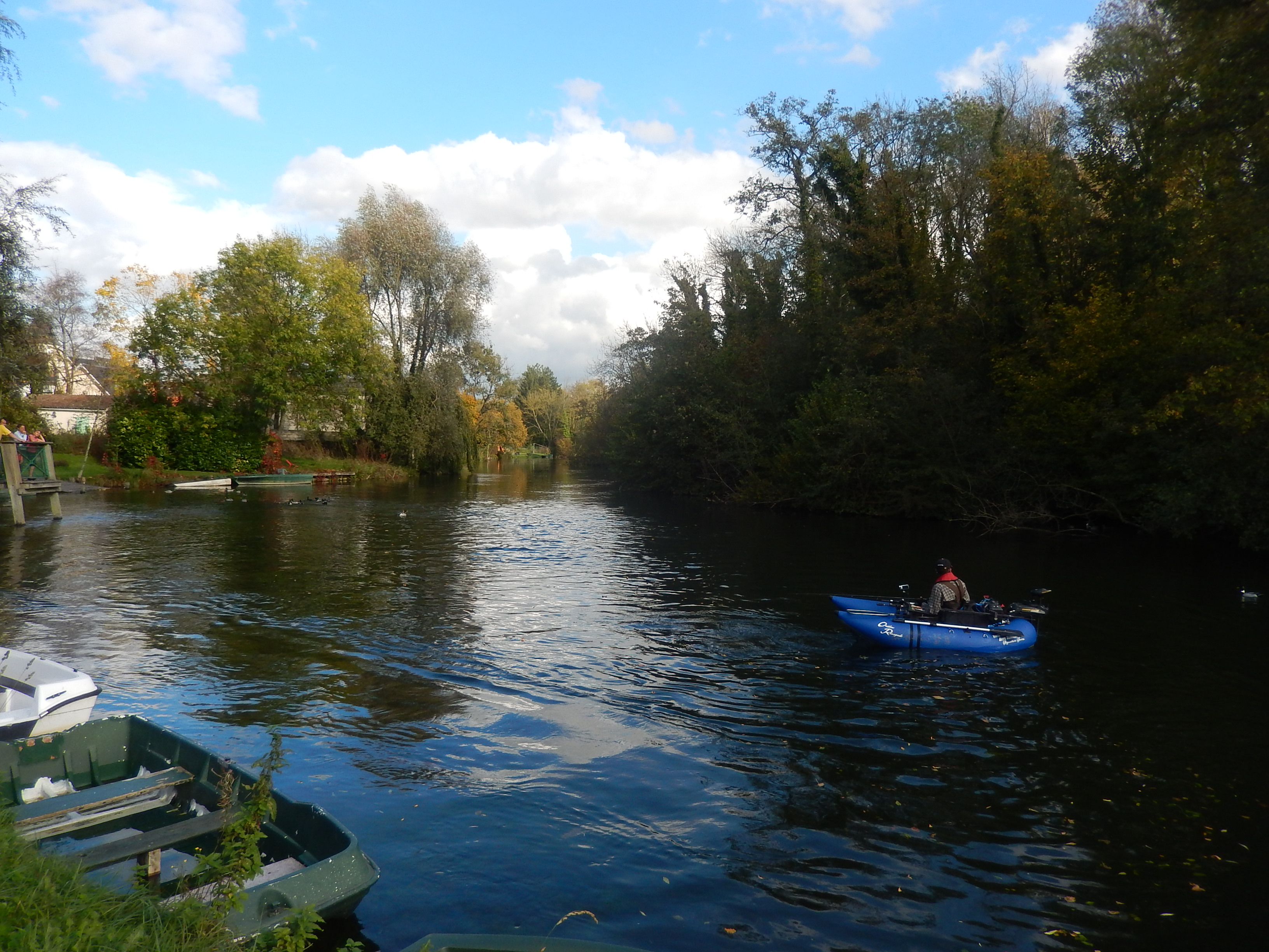 La Somme à Bray-sur-Somme près des marais du Couchant